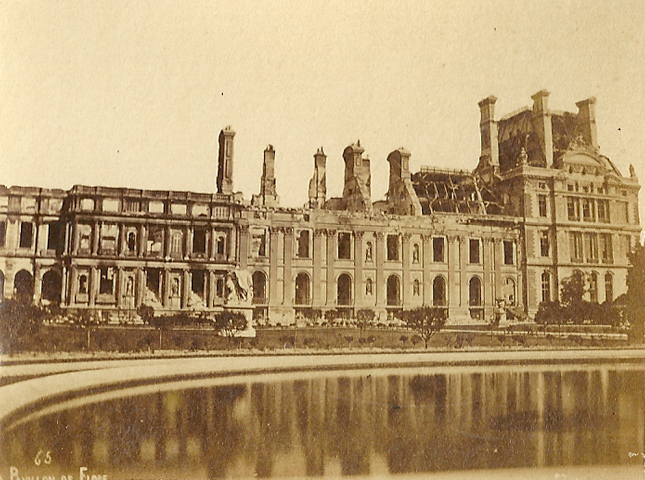 Vue du Palais des Tuileries (disparu) et du Pavillon de Flore après les incendies de 1871. Image tirée de l'Album historique "Paris incendié - 1871" édité après la Commune.